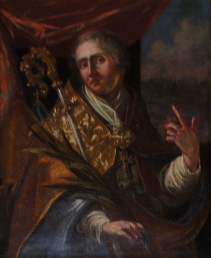 Porträtgemälde von Utto, Bischof von Freising, im Fürstengang zwischen Fürstbischöflicher Residenz und Freisinger Dom.